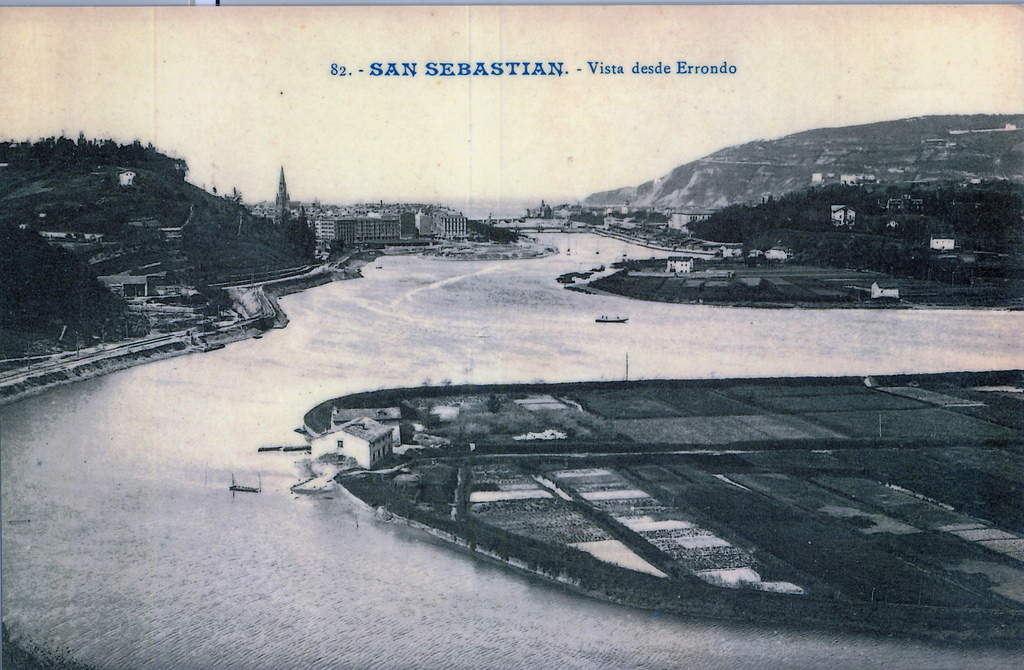 Urumea ibaia Amara zeharkatzen.